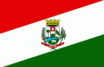 Bandeira Oficial de Muitos Capões - RS - Brasil.